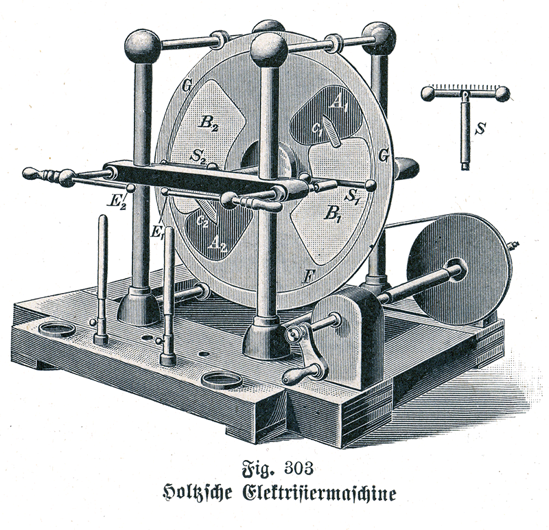 Holtz electrostatic generator